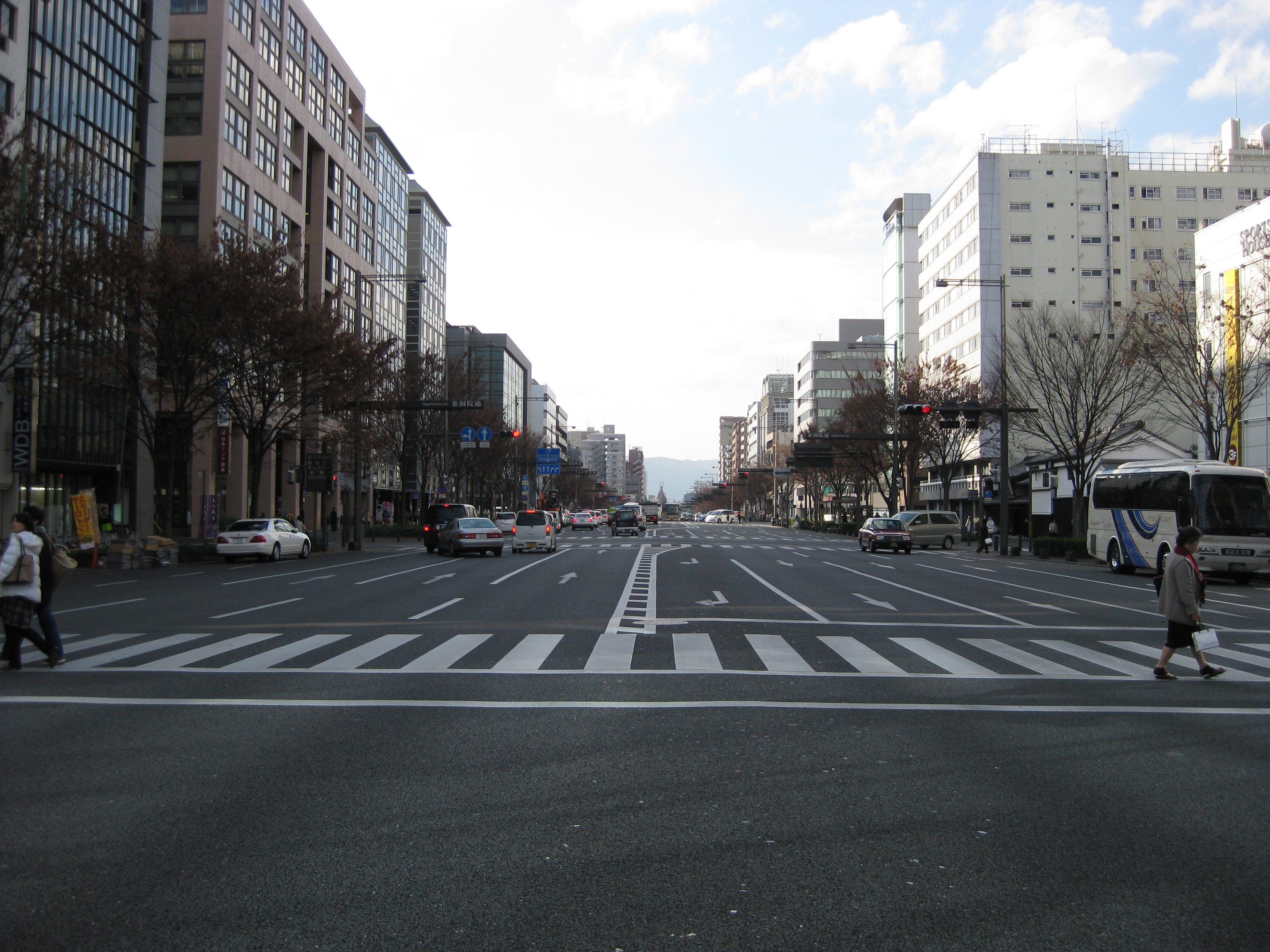 御池通 京都市中京区 間之町通との交差点から西方向